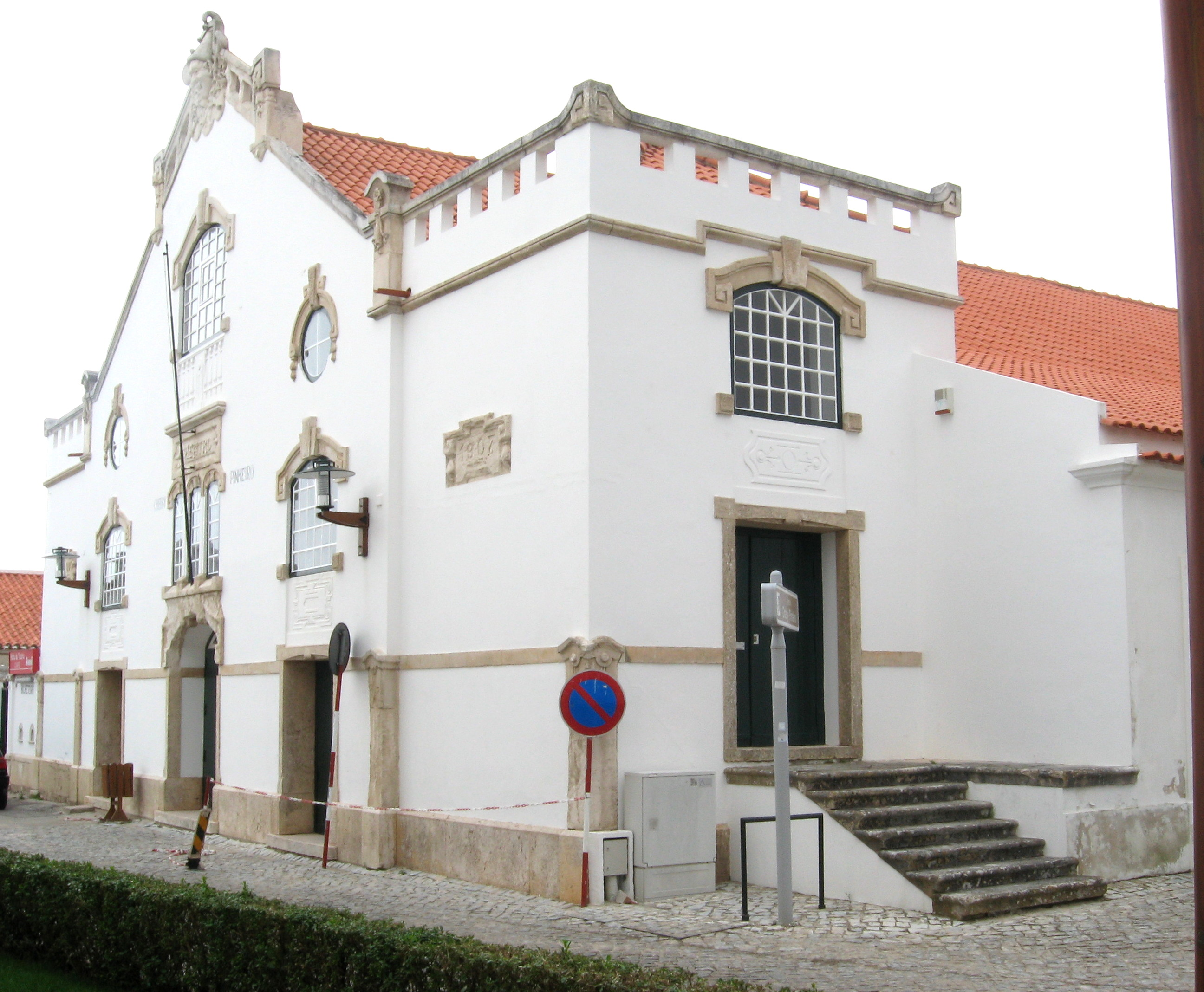 Nazaré, Portugal, Sítio, Santuário de Nossa Senhora da Nazaré, Theater Chaby Pinheiro of 1926